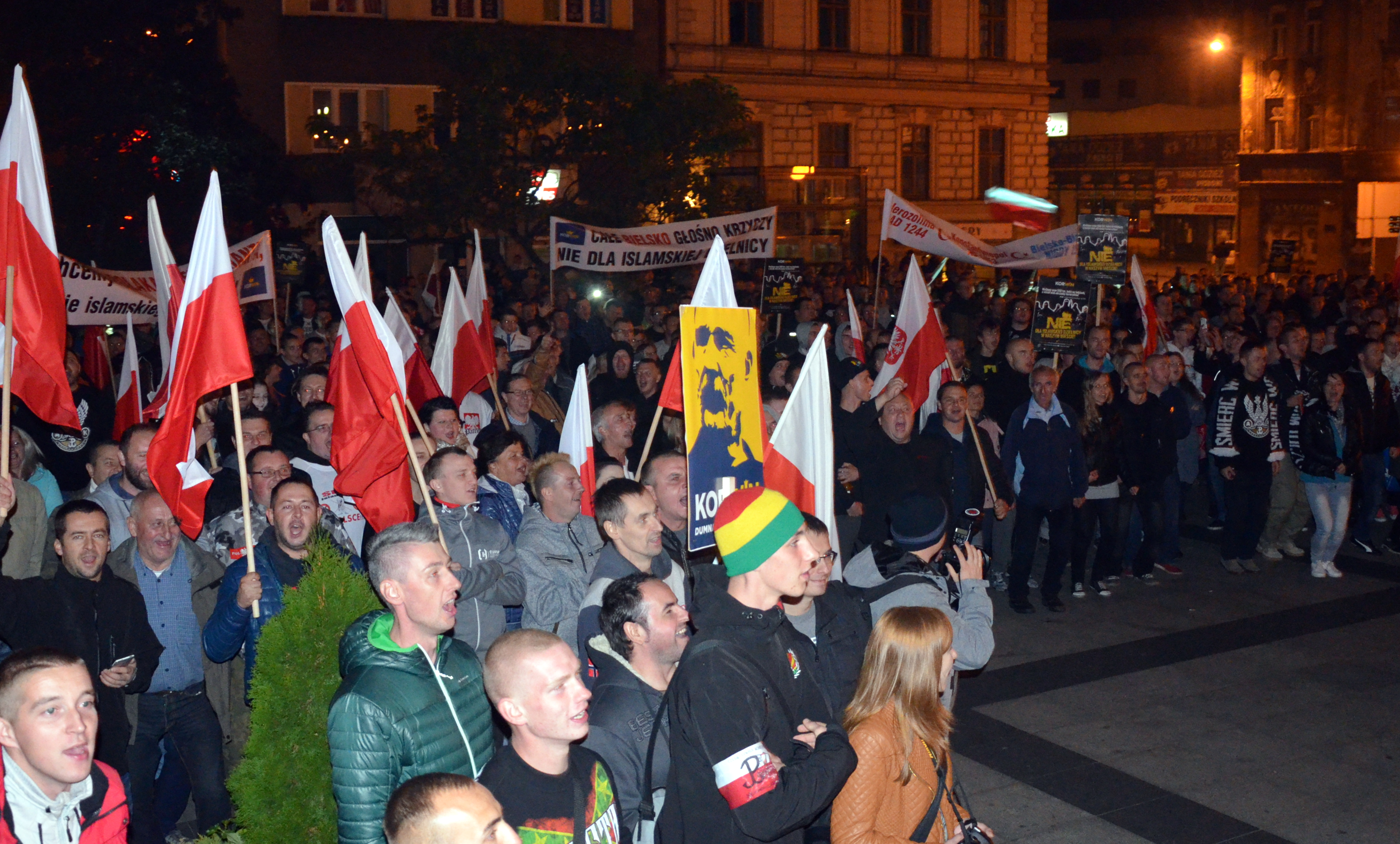 Der anti-islamische Protest in Polen